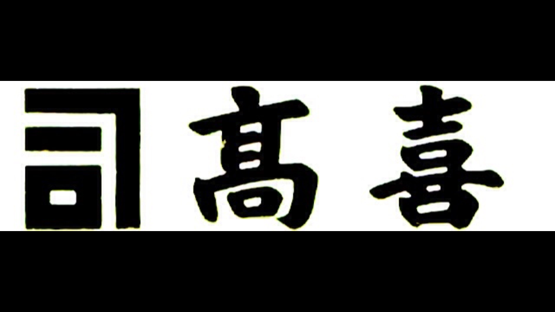 株式会社高喜初代ロゴ